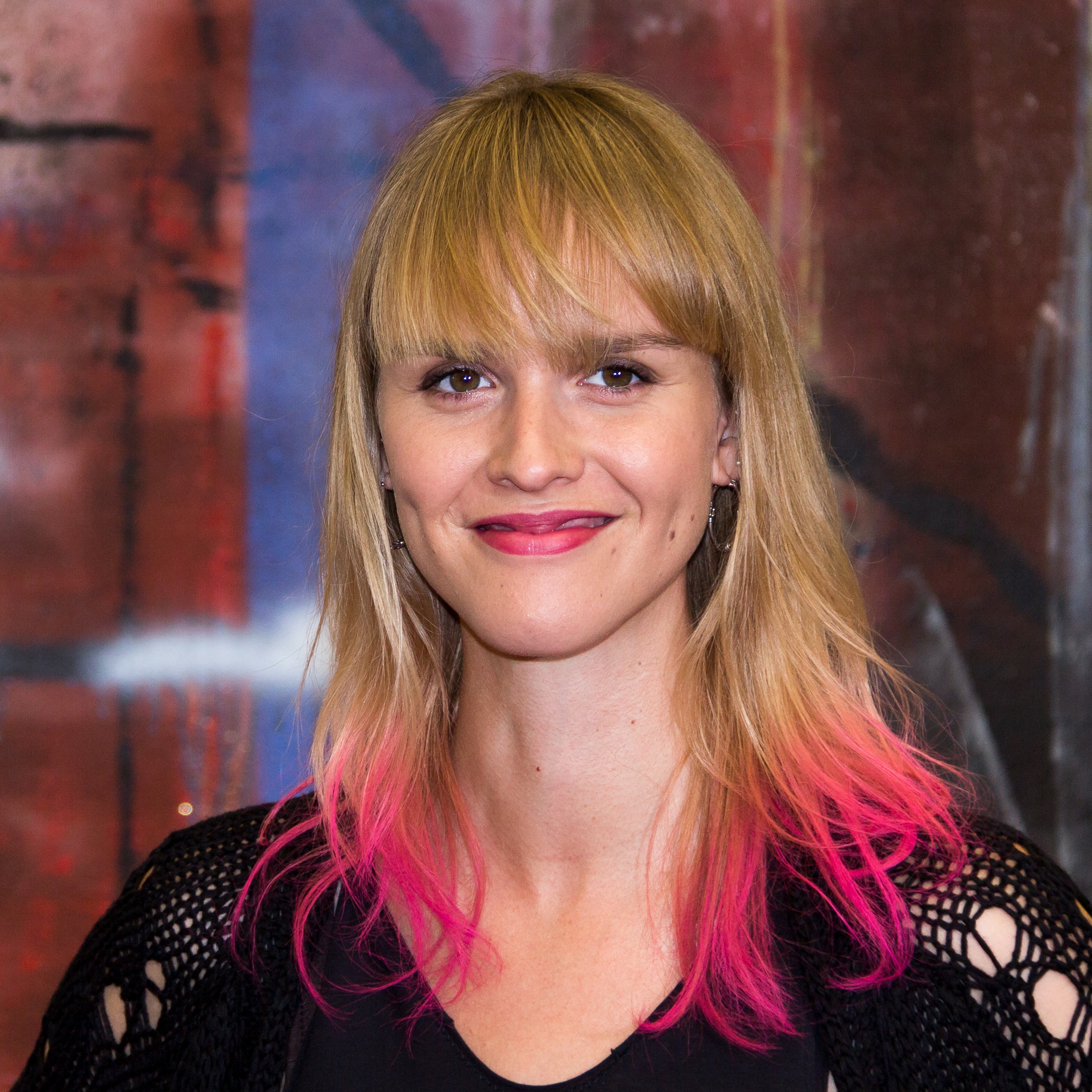 Pressetermin 30 Jahre Lindenstraße - Cosima Viola in der Rolle der Jaqueline „Jack“ Aichinger